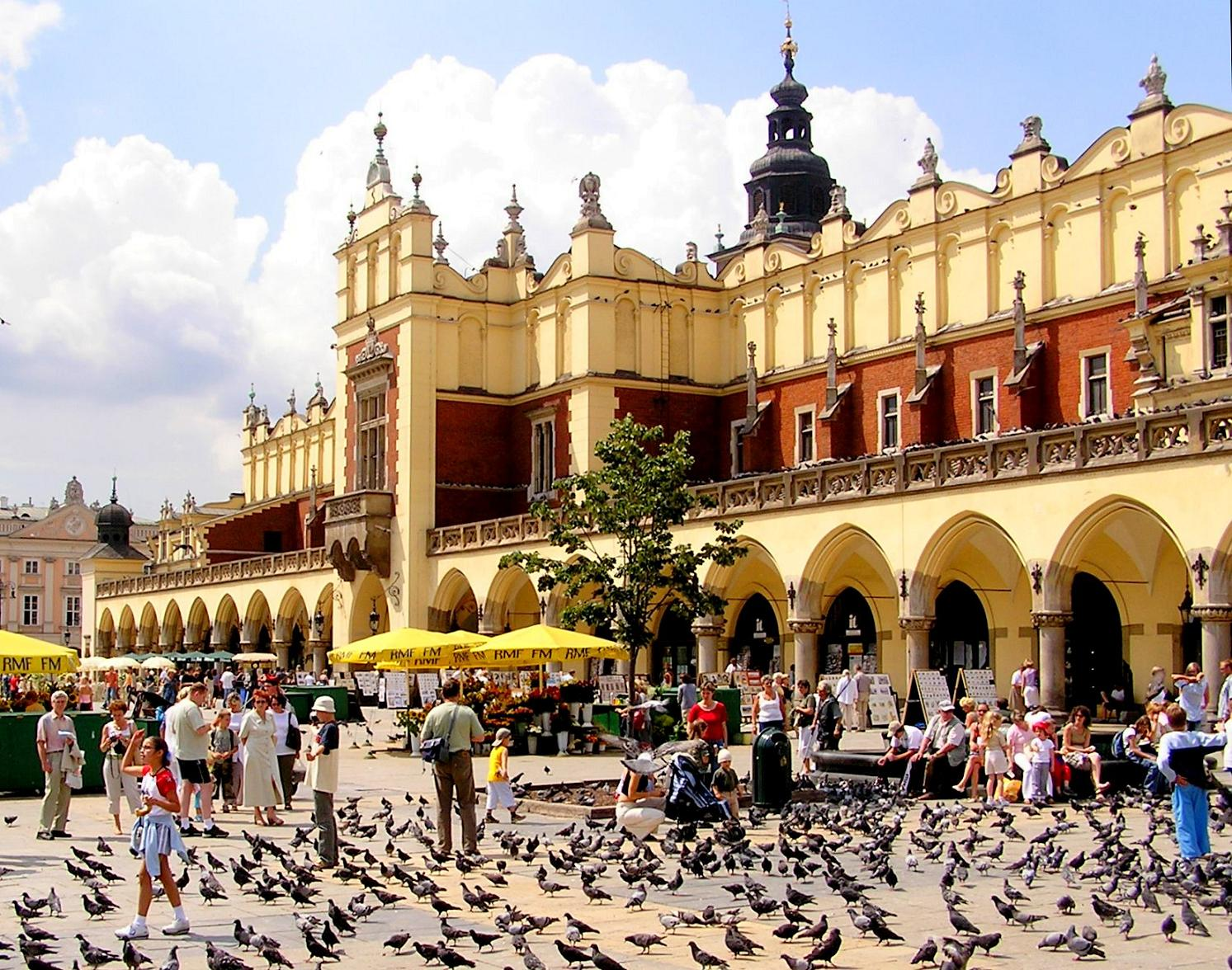 Sukiennice, turyści, gołębie Autor: Eteru